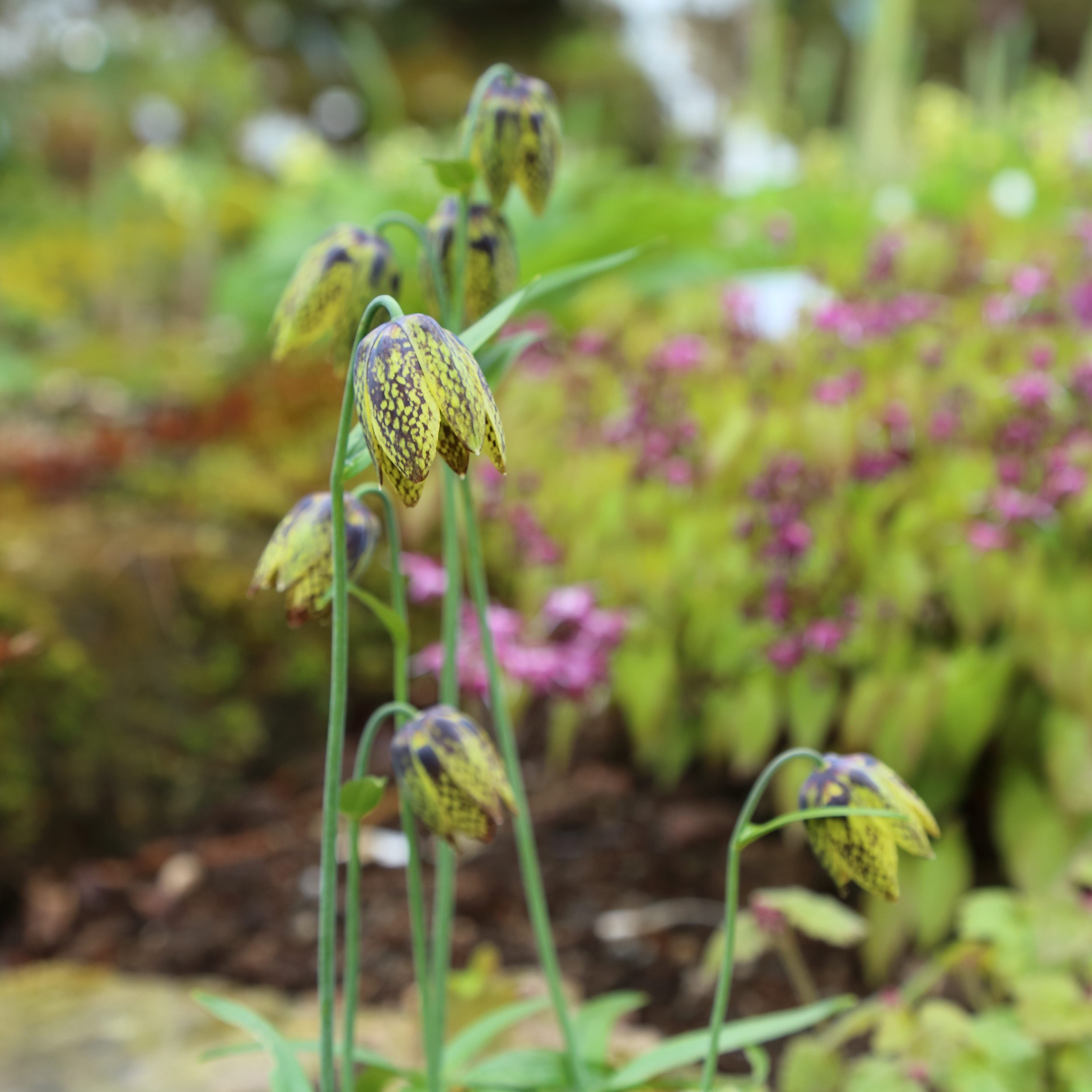 Fritillaria dagana identifierad med hjälp av skylt i Göteborgs botaniska trädgård.